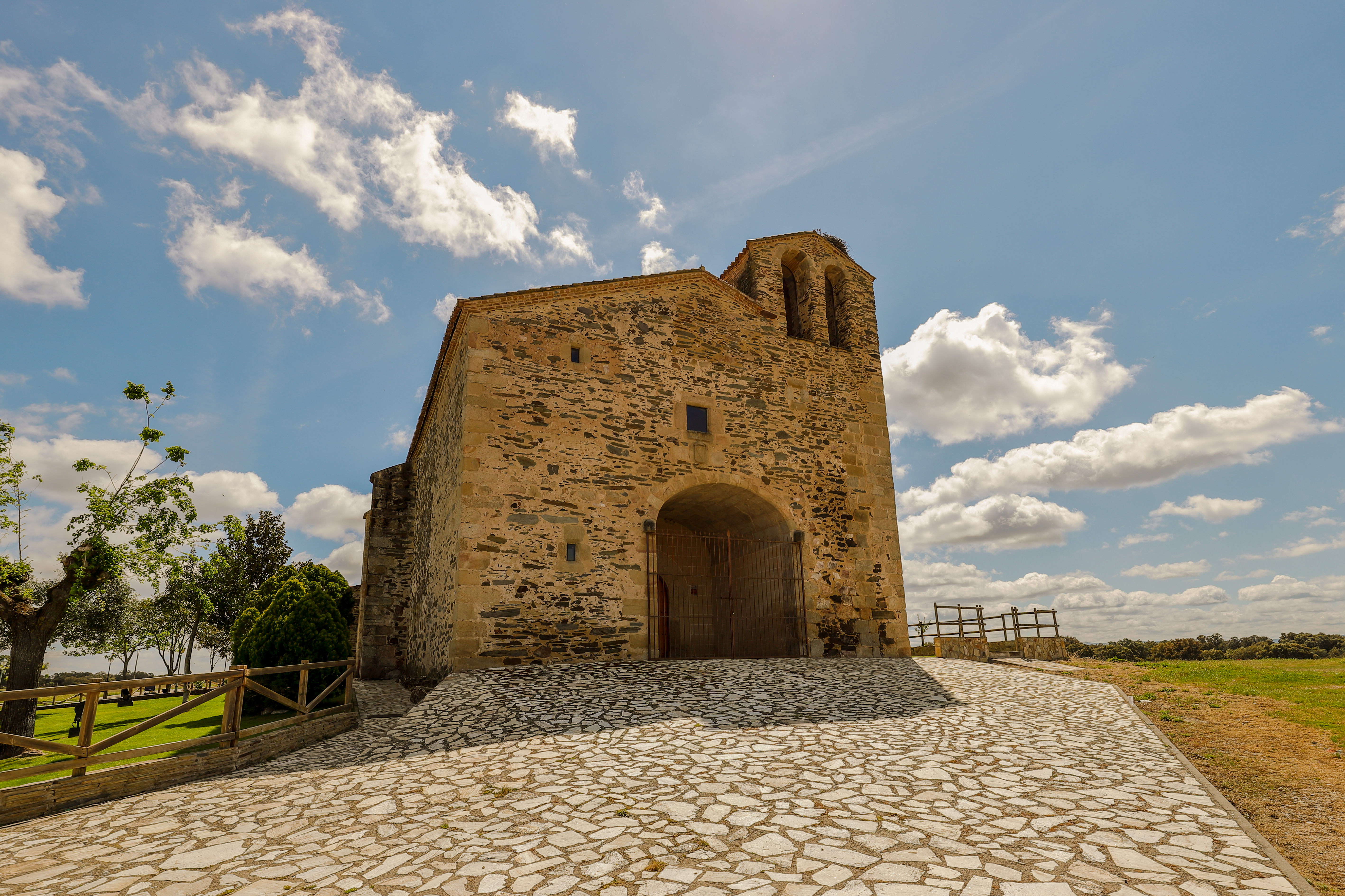 Toril es un municipio de la comarca Campo Arañuelo, en la provincia de Cáceres.